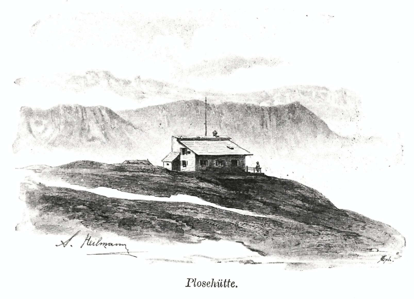 Plosehütte aus Zeitschrift des Deutschen und Oesterreichischen Alpenvereins 1894 Band 25